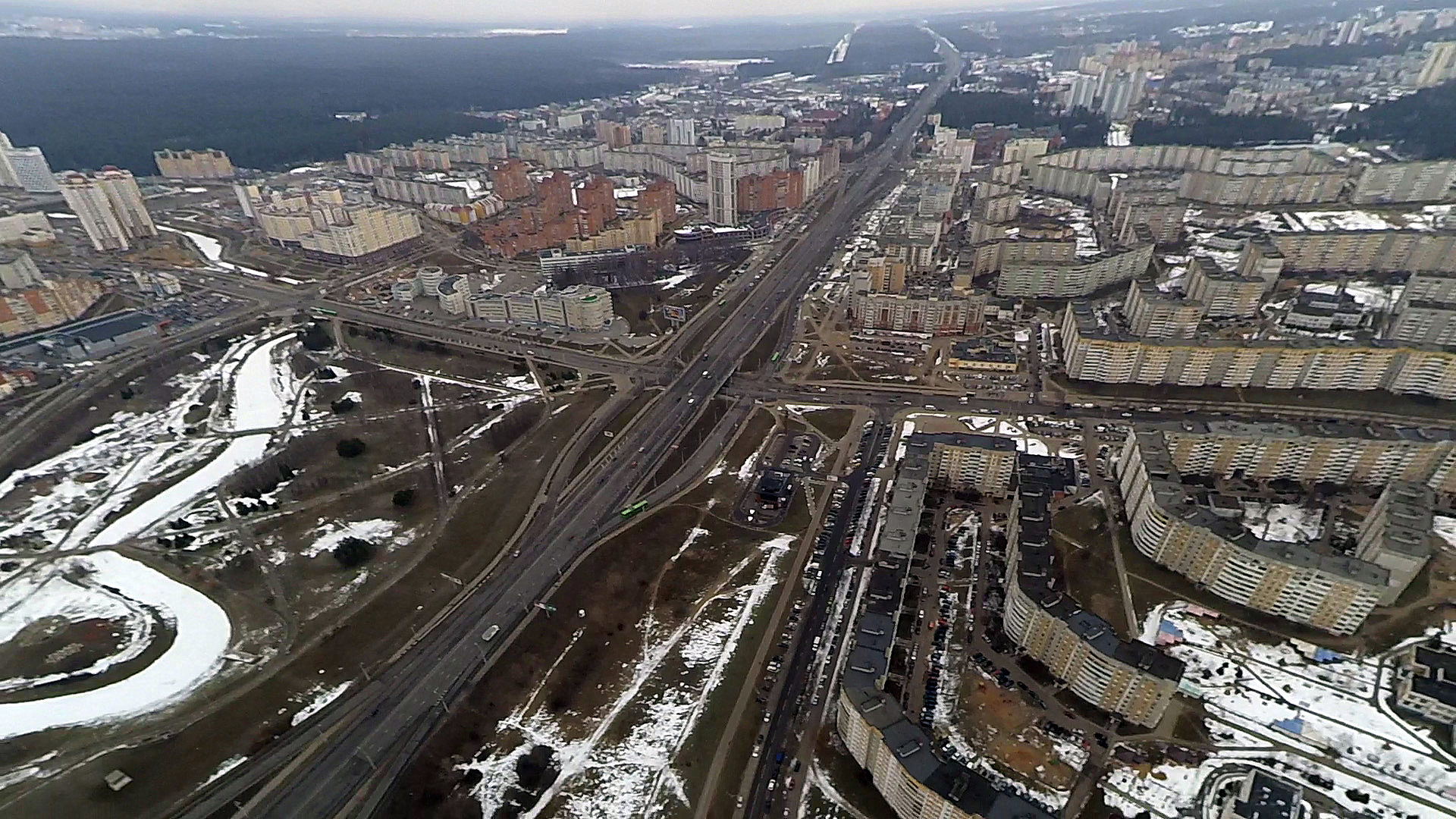 Uruchcha, Minsk, Belarus